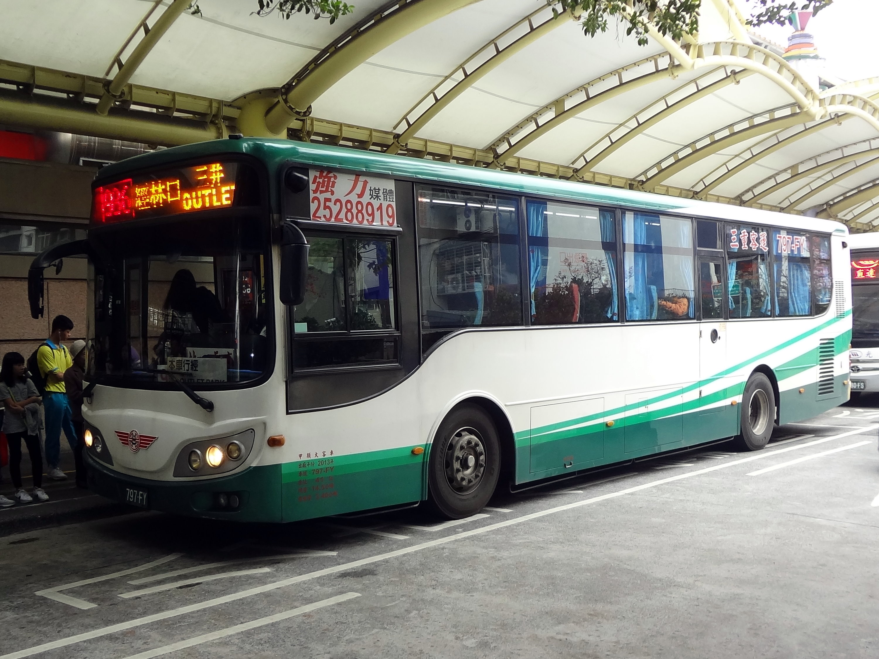 三重客運2013年大客車797-FY，停靠圓山轉運站。